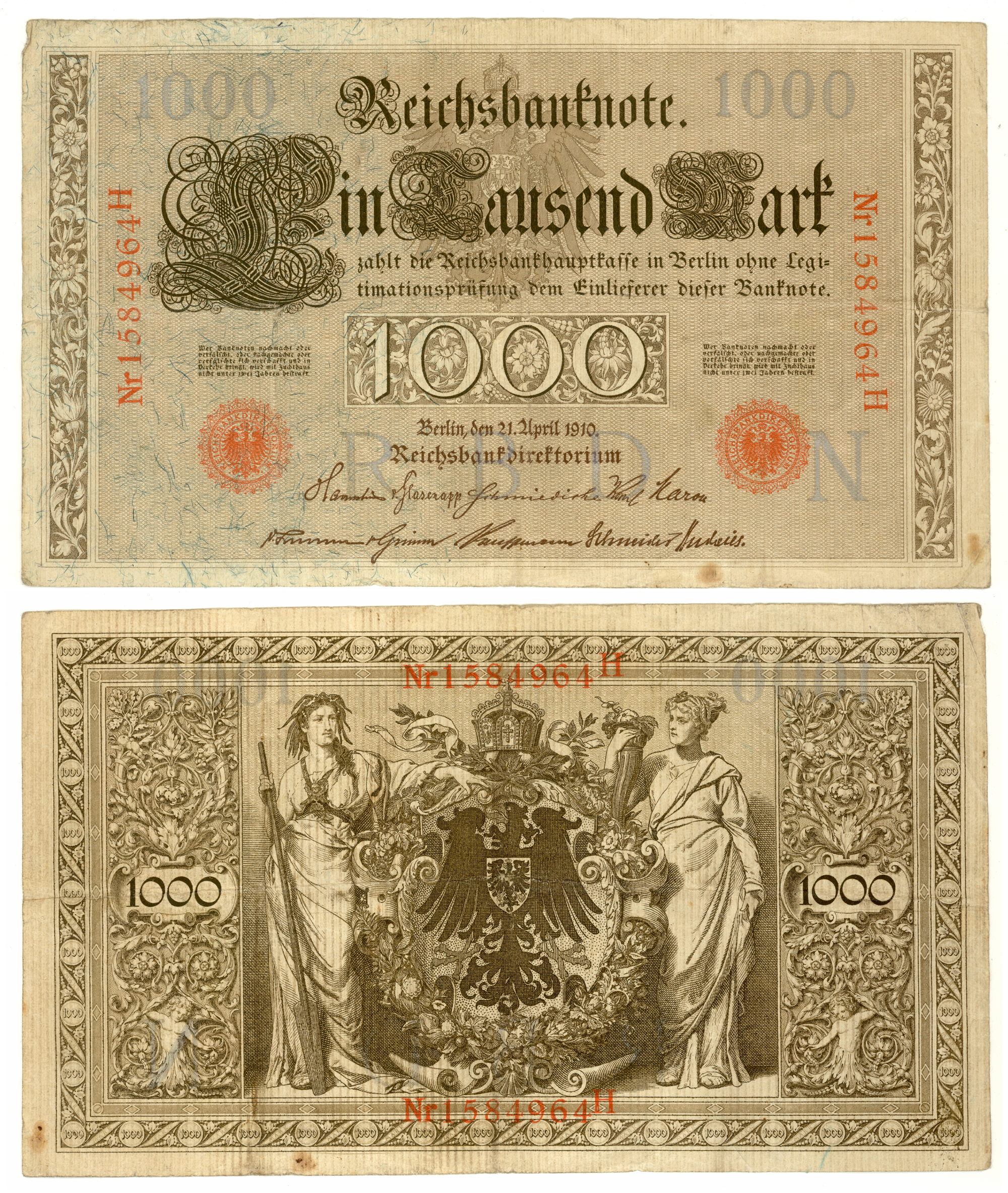 1000 Mark-Schein von 1910